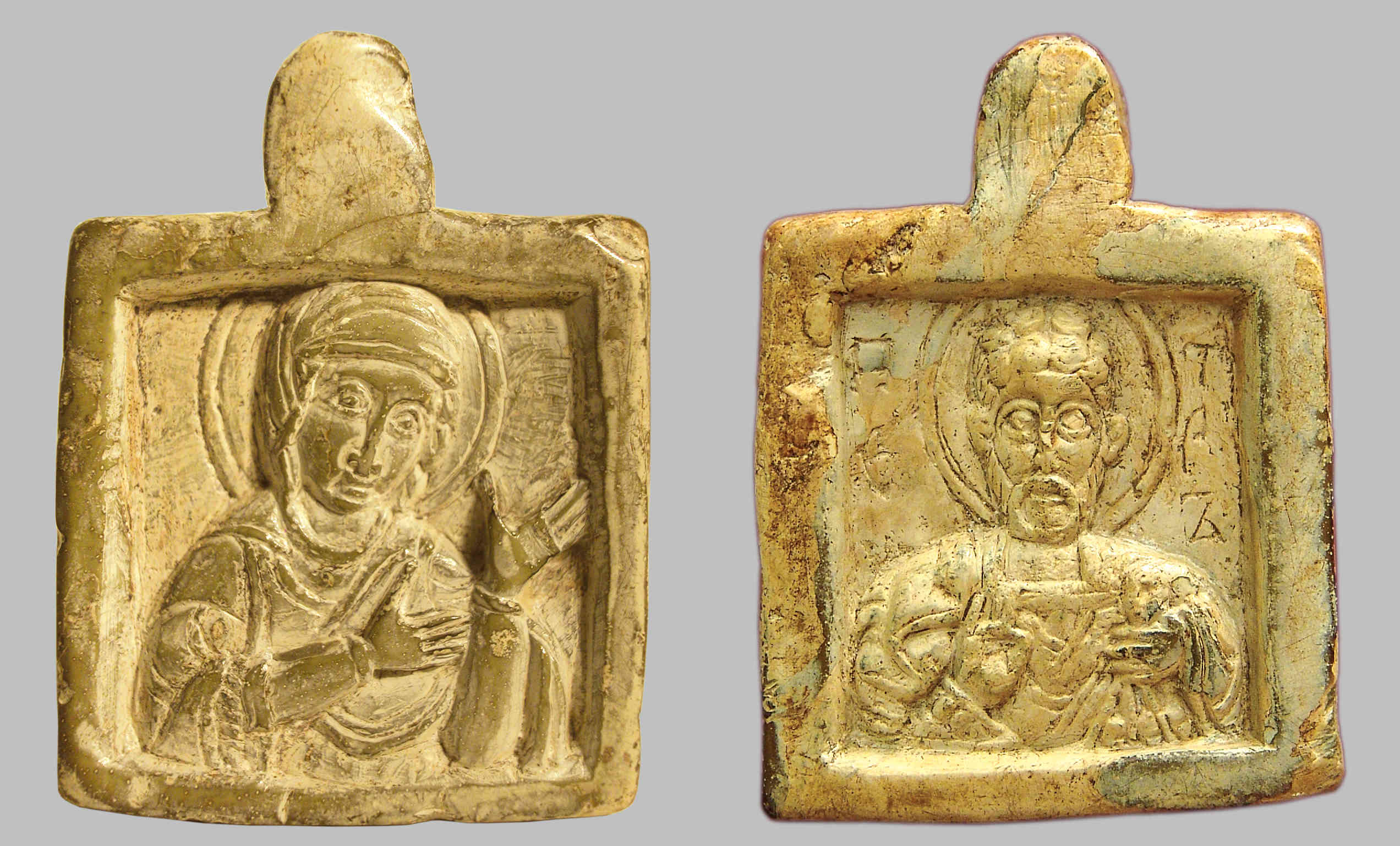 4,5×3,4×0,4 см